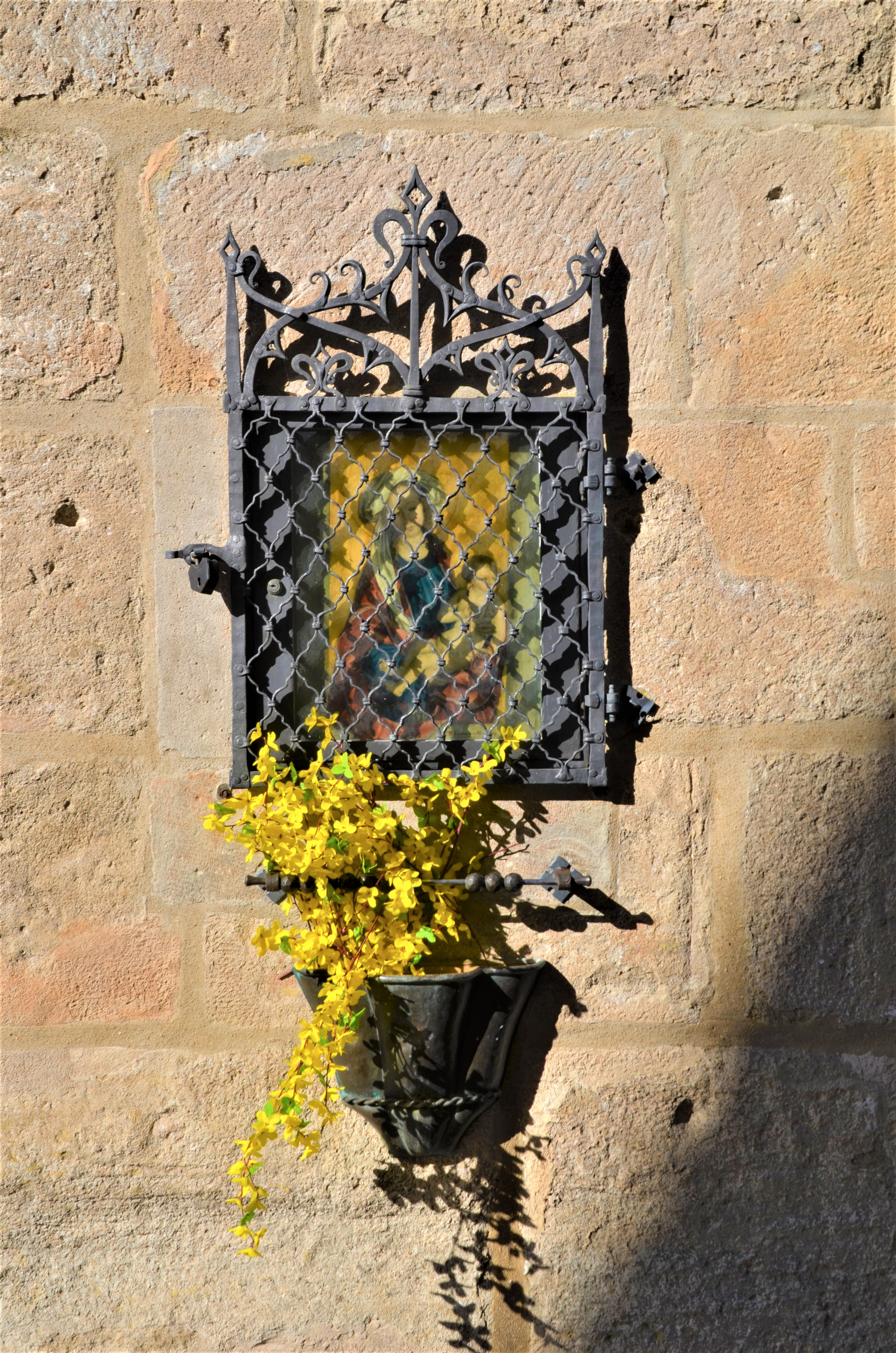 Bildstock mit Rosenkranz am Glockenturm in Schw. Gmünd